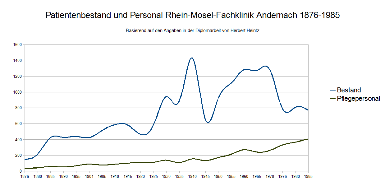 Verhältnis der Patientenzahl zu Pflegern+Ärzten an der RMF Andernach